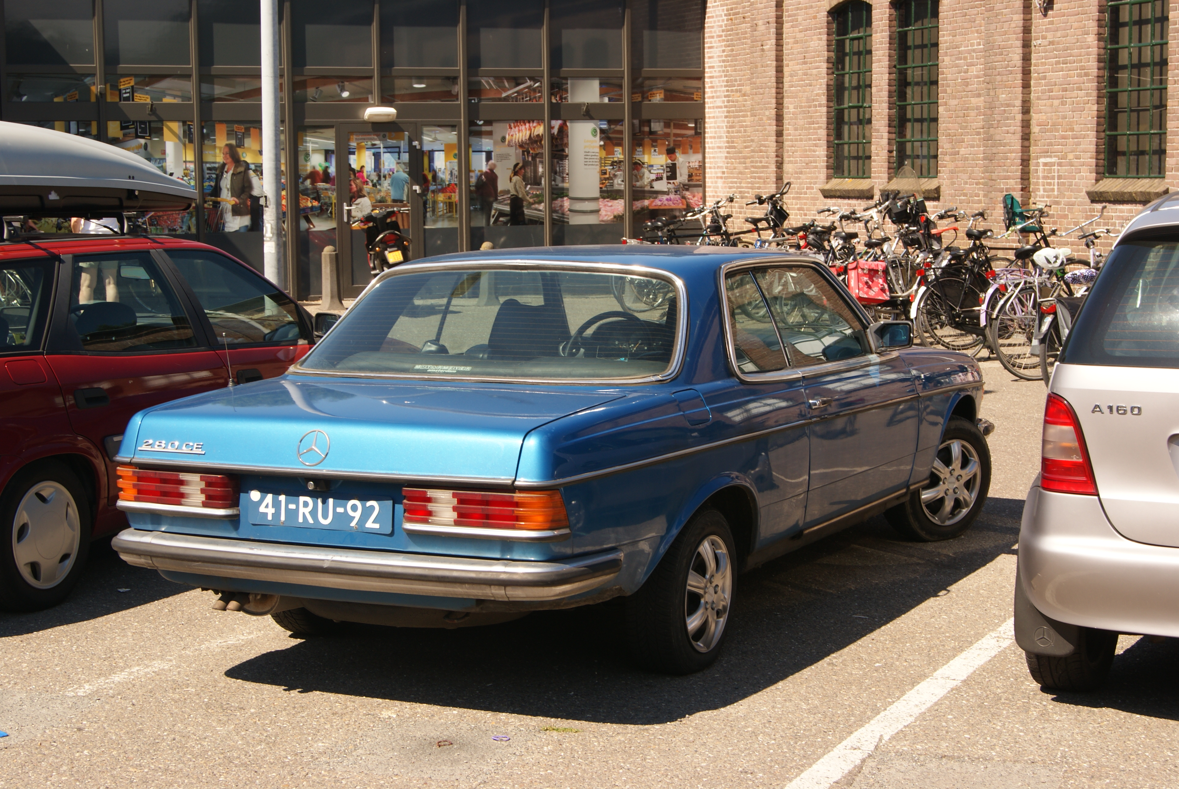 41-RU-92